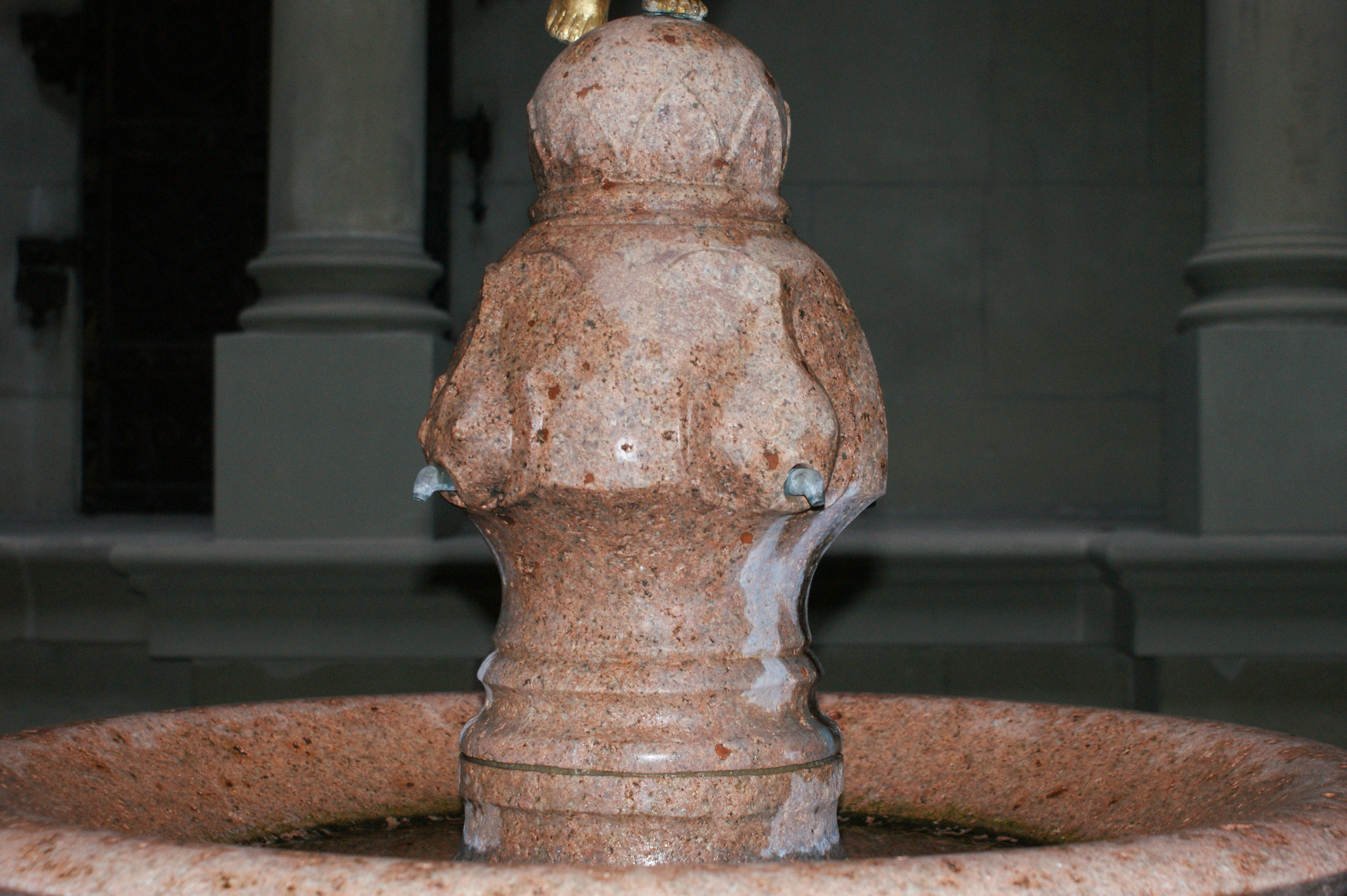 Obere Wasserröhren des Rathaushofbrunnen